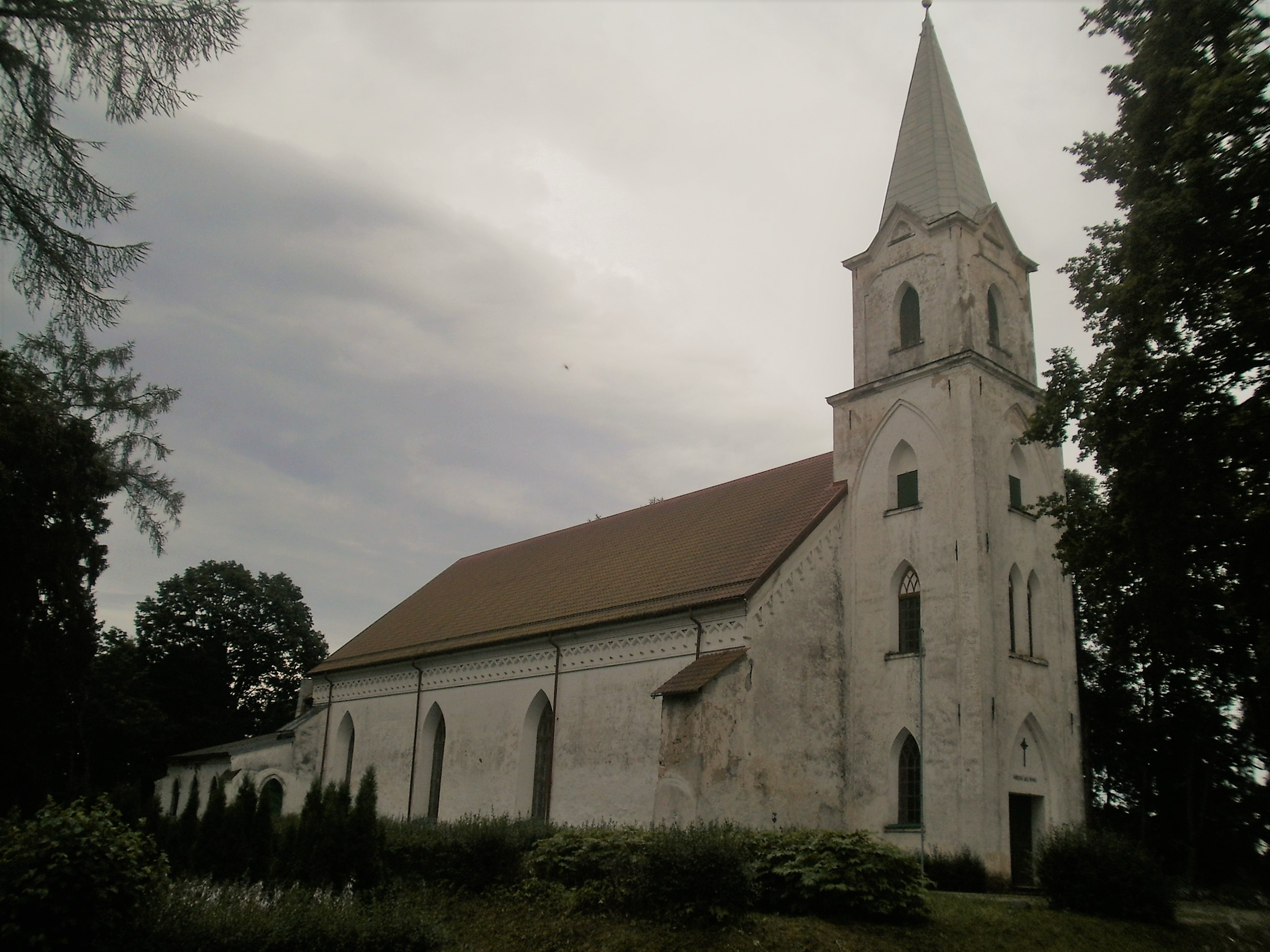 Vaade loodest. Kirikuhoone on traditsiooniliselt ida-lääne suunaline.